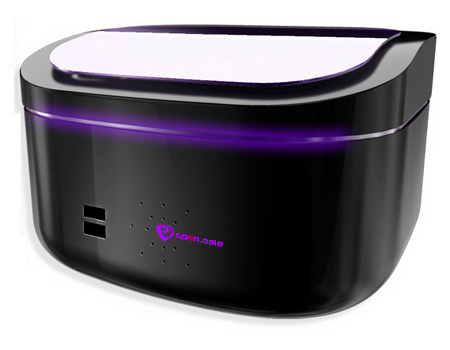 Mini Ordinateur OpenGate